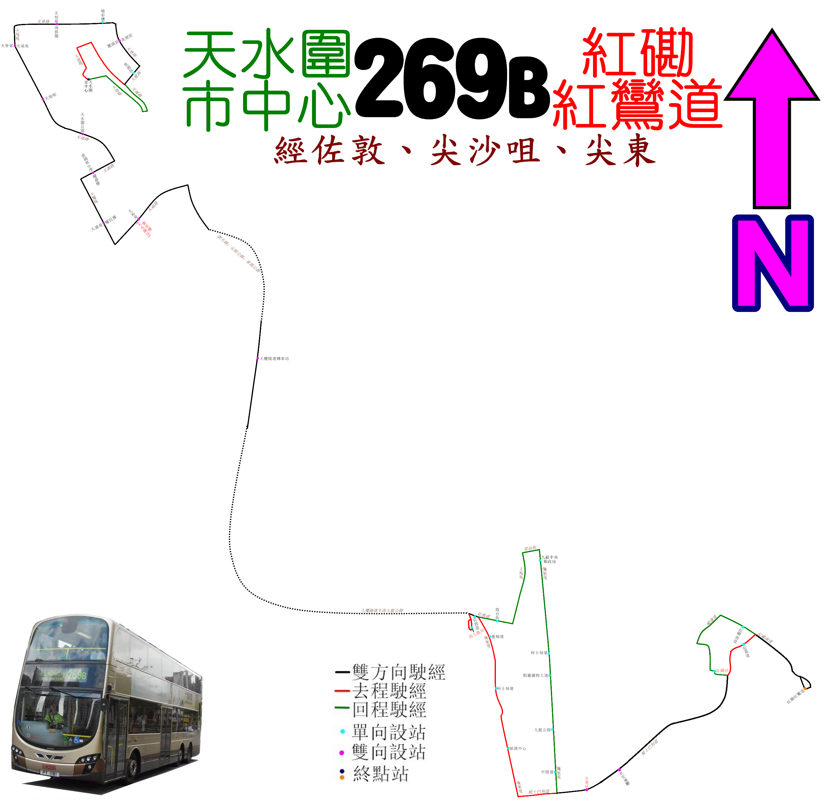 中文（香港）: 九巴269B線的走線圖